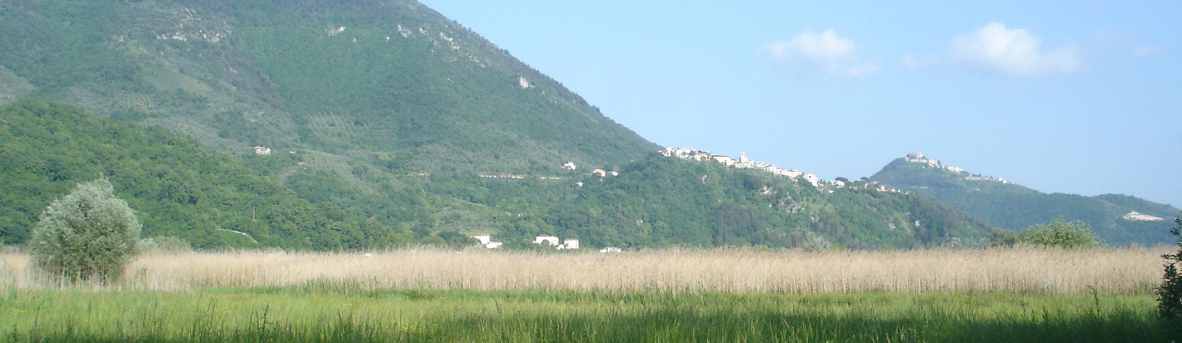 Il centro storico di Posta Fibreno e sullo sfondo il castello di Vicalvi.